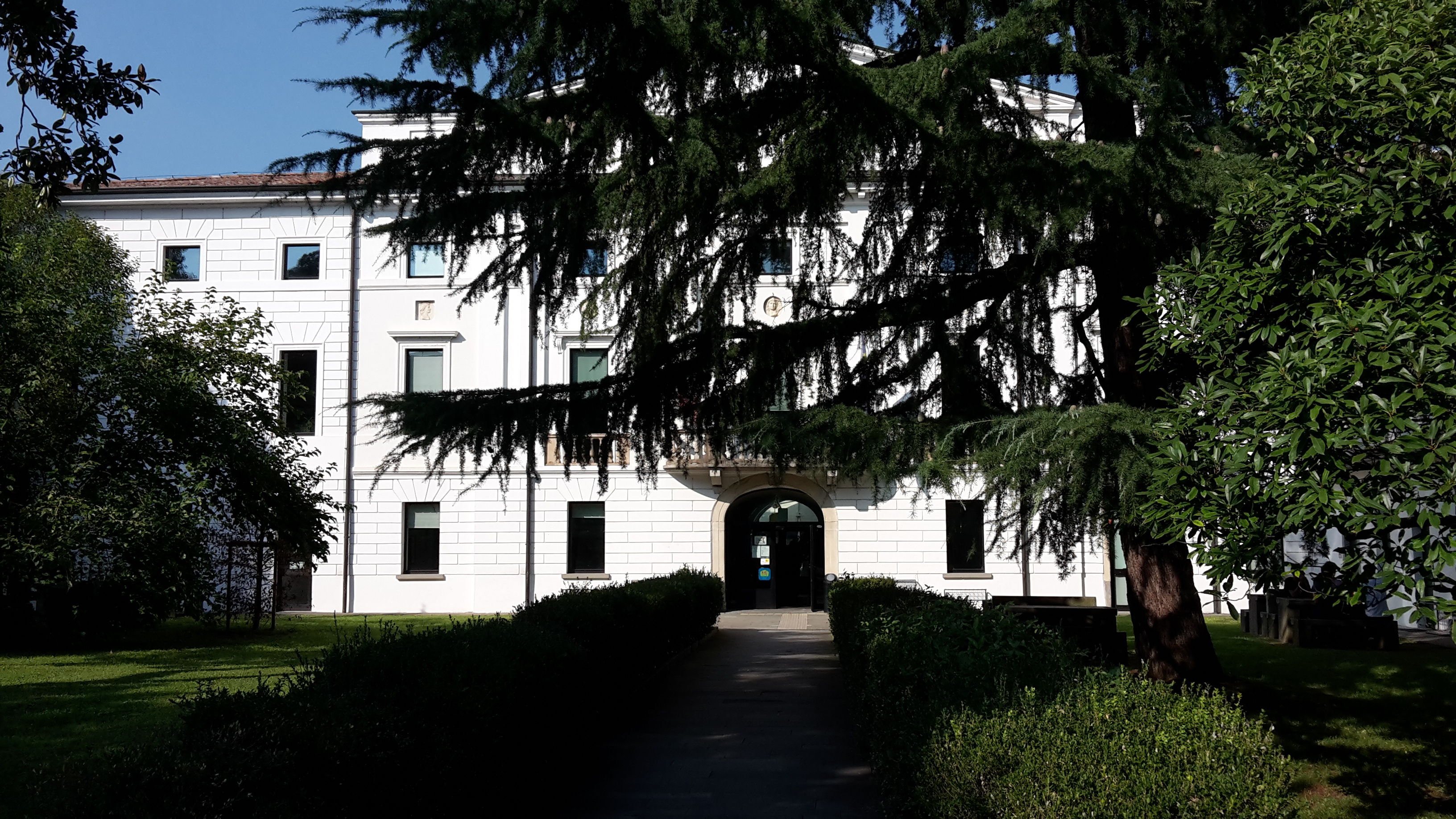 Вилла семьи Гуерринони в Сериате, фасад